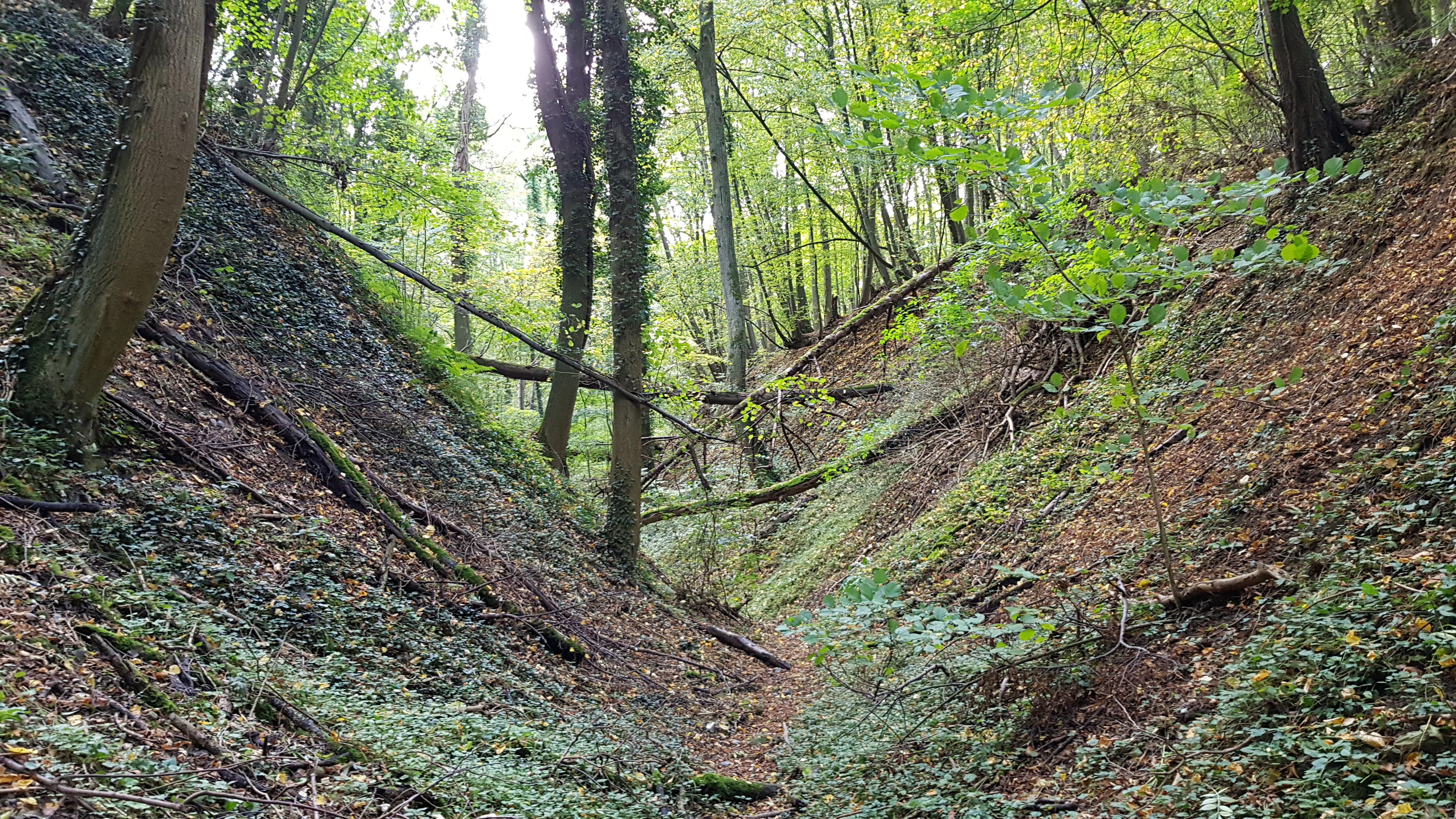 Schone Grub in het Savelsbos, Rijckholt, Nederland